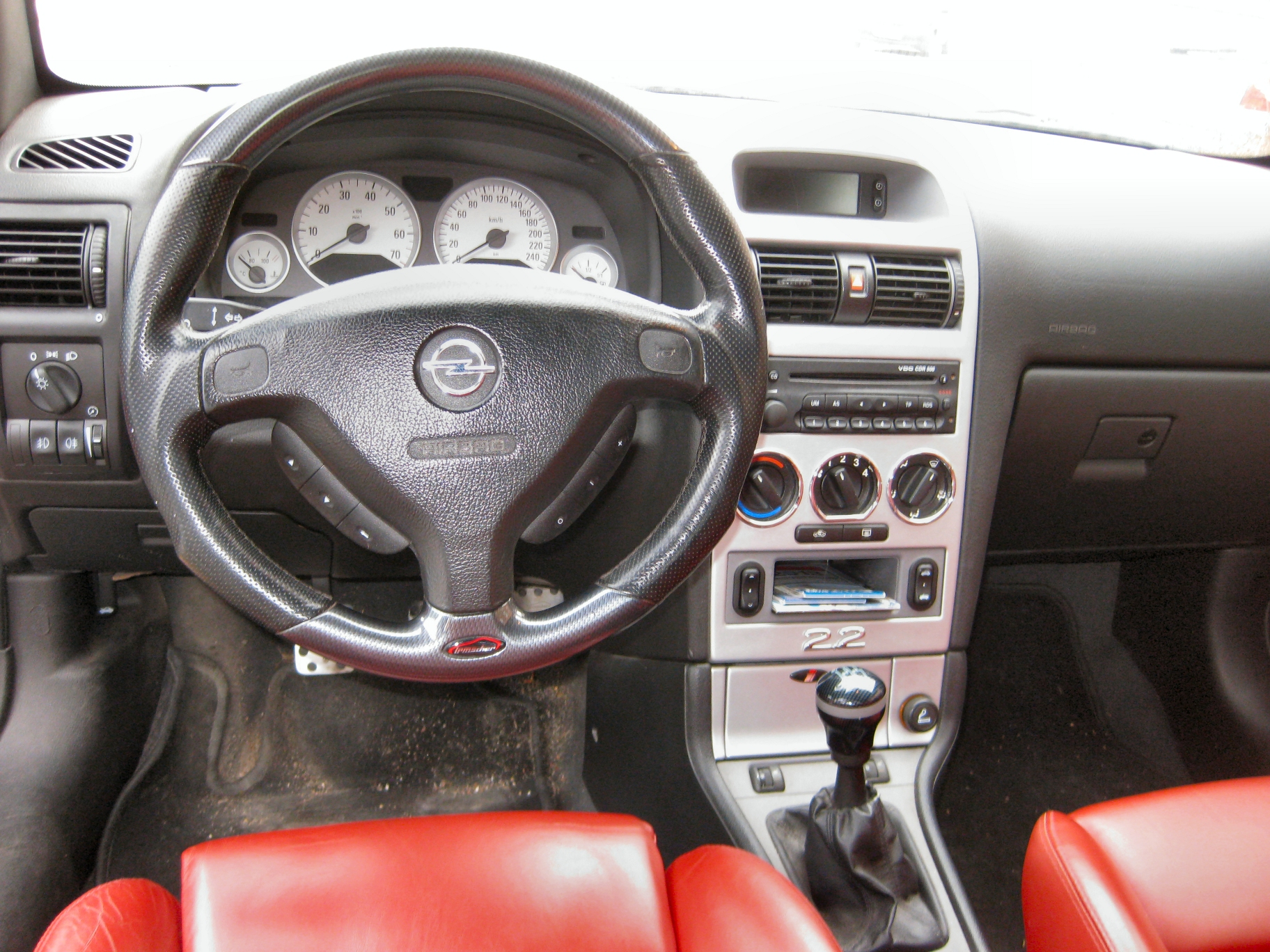 Cockpit des Opel Astra G Cabrio